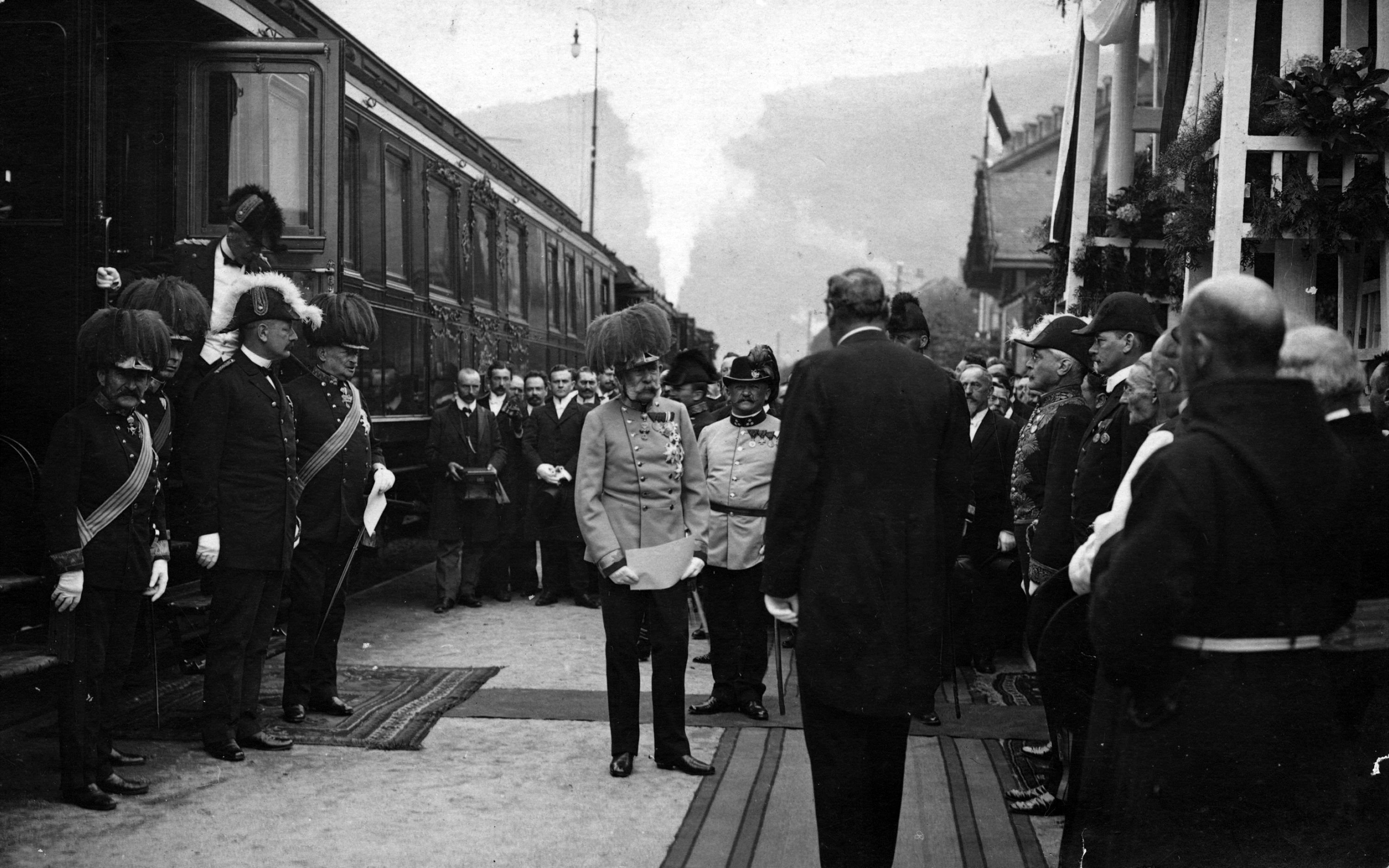 k.u.k. Hofzug Begrüßung Kaiser Franz Josefs am Bahnhof Bregenz